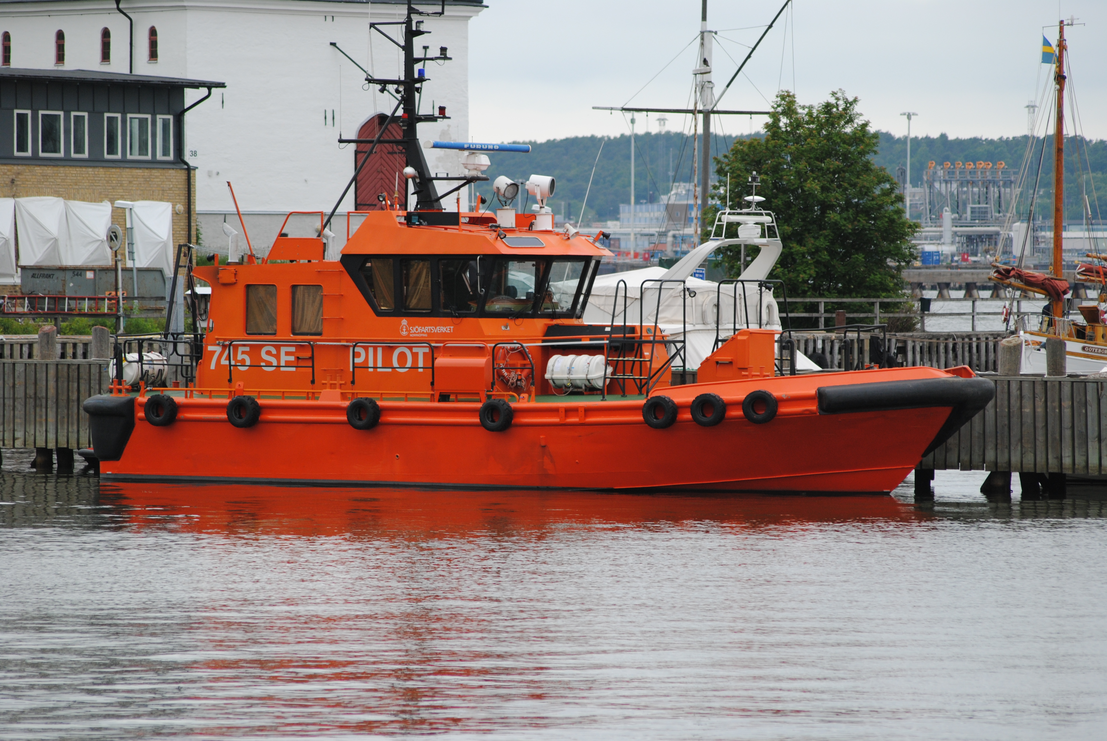 Pilot 745 Ligger vid nya varvets brygga